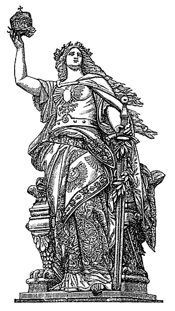 J. Schillings Germania, vom Niederwalddenkmal